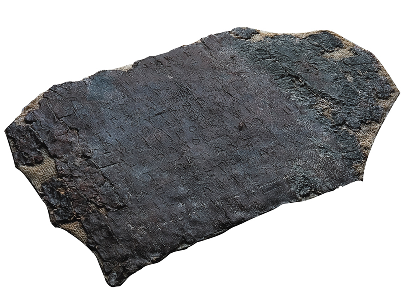 Carta comercial grega sobre làmina de plom trobada a Empòrion (Empúries) (MAC-Empúries)